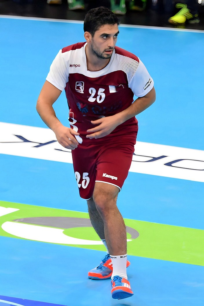 Le 10 janvier 2016 lors du match Norvège / Qatar durant la Golden League à l'AccordHotel Arena (Paris). Kamalaldin Mallash